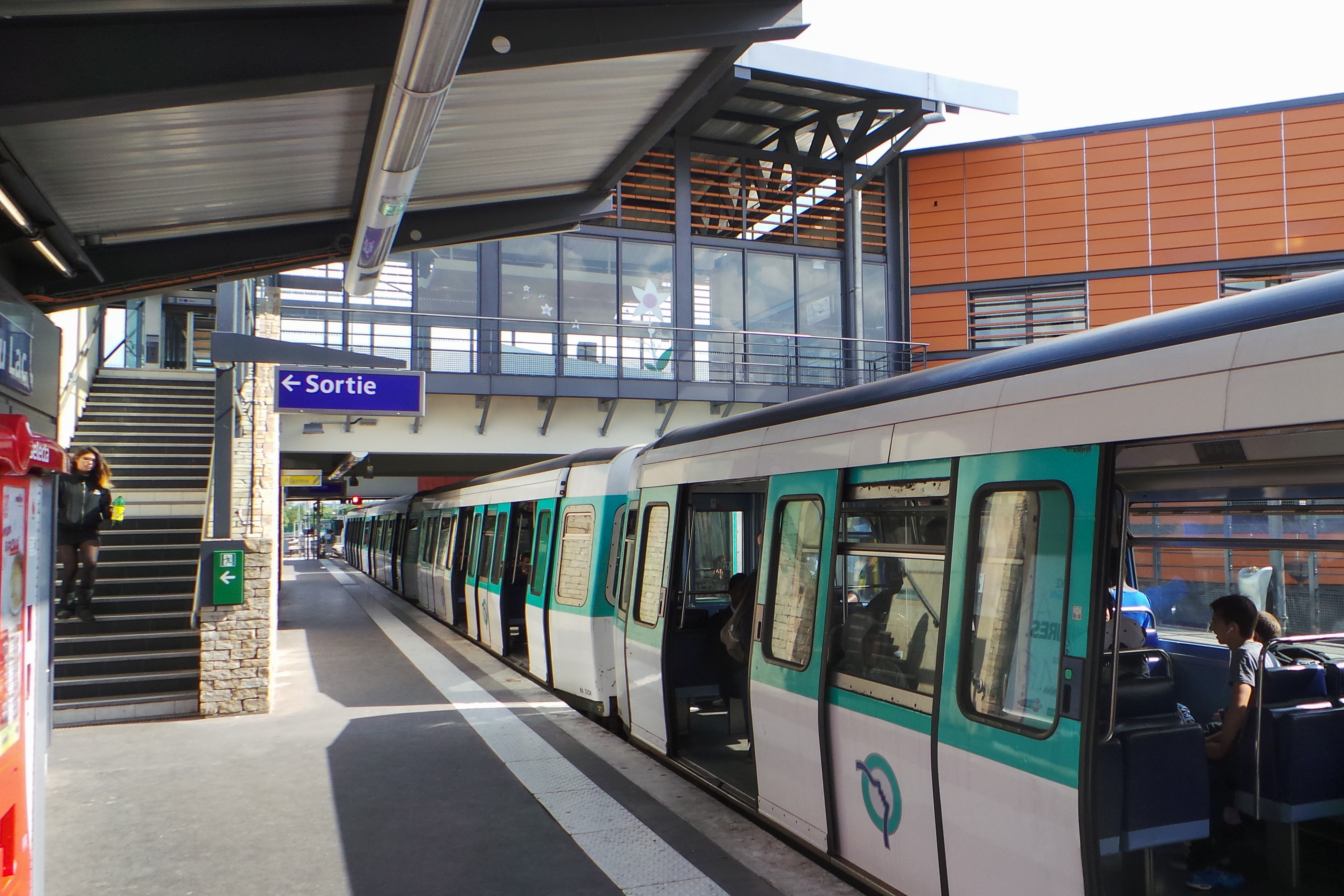 Station de métro Pointe du Lac, métro de Paris ligne 8, Créteil, France